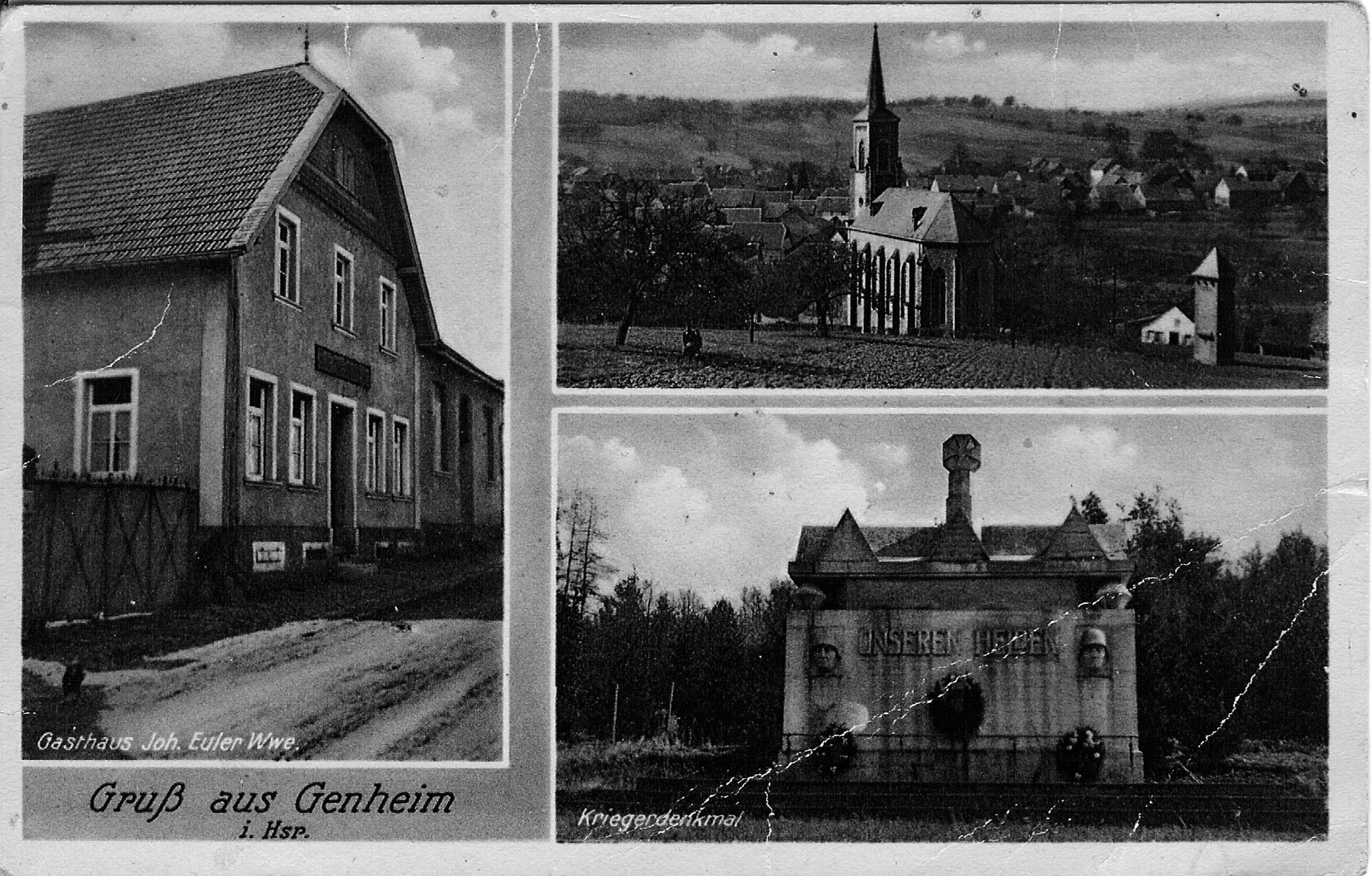 Historische Postkarte aus Genheim. Titel: "Gasthaus Joh. Euler Wwe." Gezeigt wird das spätere Gasthaus Gass welches seit mehr als 20 Jahren geschlossen ist, das Dorfpanorama mit ev. Kirche und das Kriegerdenkmal welches heute noch existiert.